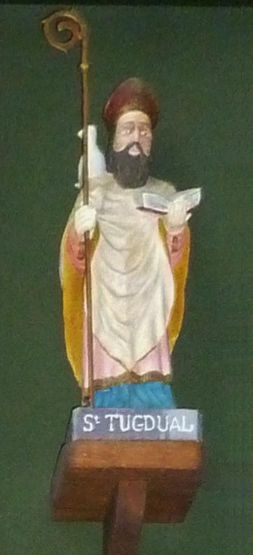 Saint-Pol-de-Léon : chapelle Notre-Dame du Kreisker, Saint Tugdual, un des sept saints du Tro Breiz